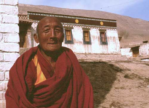 Mönch im Rongwo-Kloster, Aufnahme vom Herbst 1990, gemacht von User:Gruschke